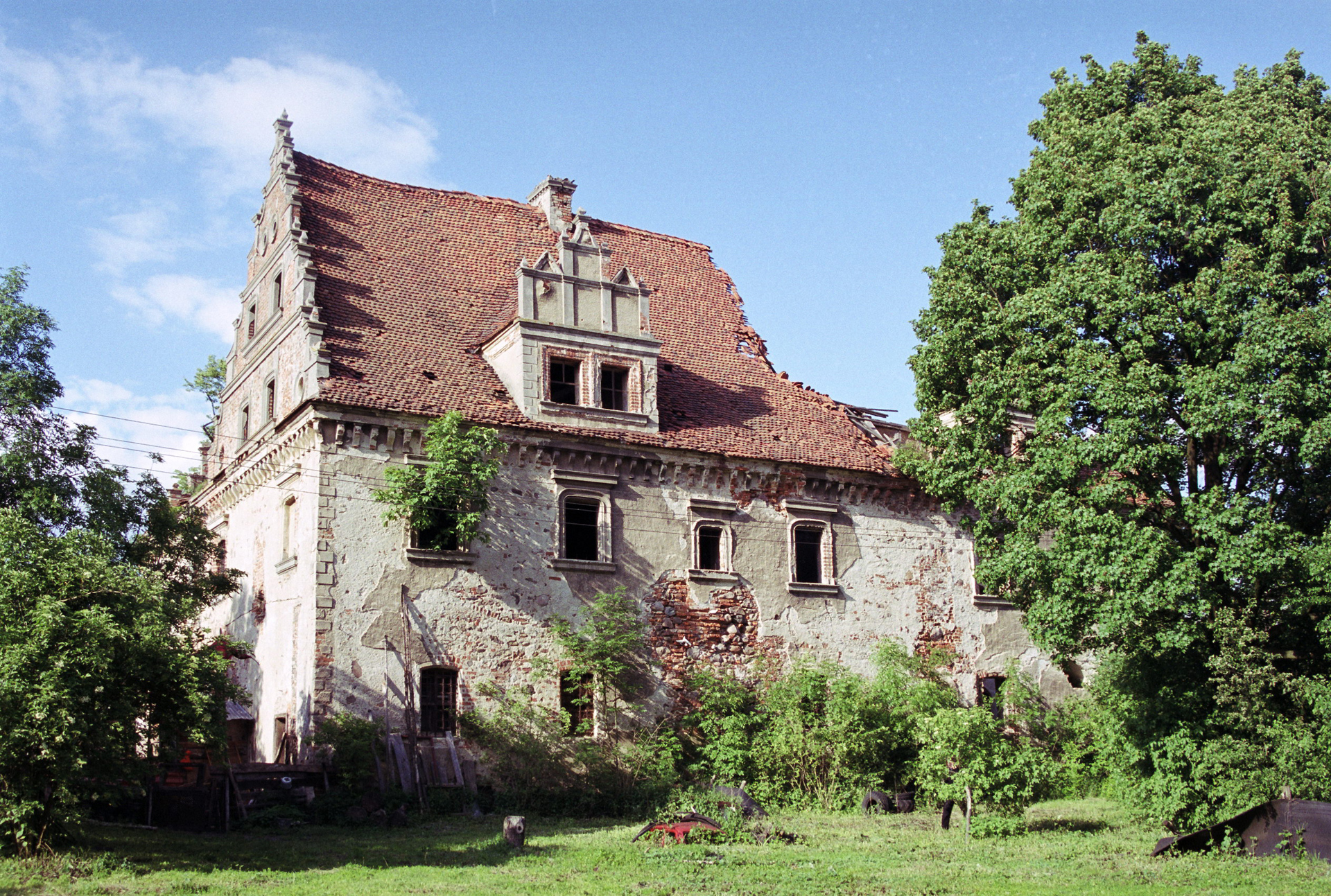 Dziewin - pałac (ruina)